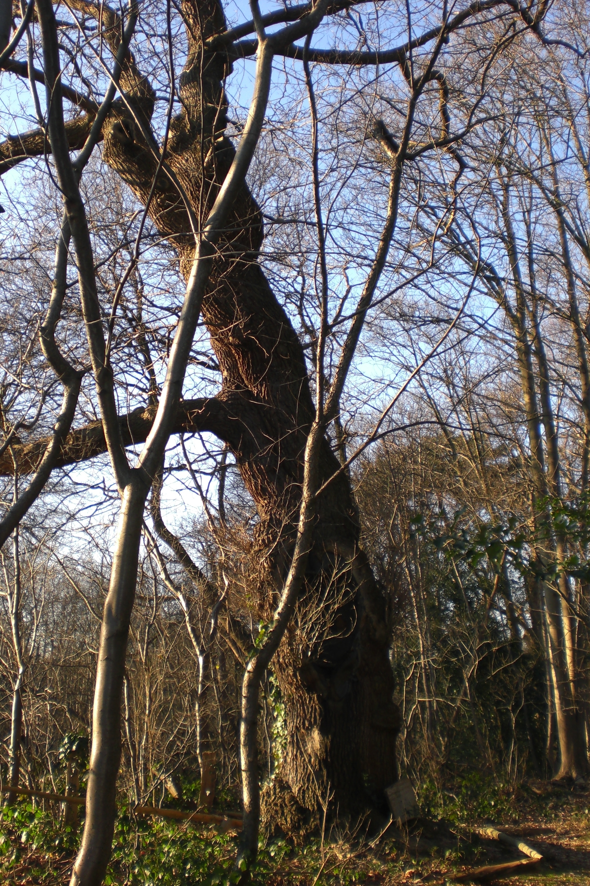 Kaisereiche im ehemaligen Park von Gut Kaisersruh in Würselen nahe Aachen